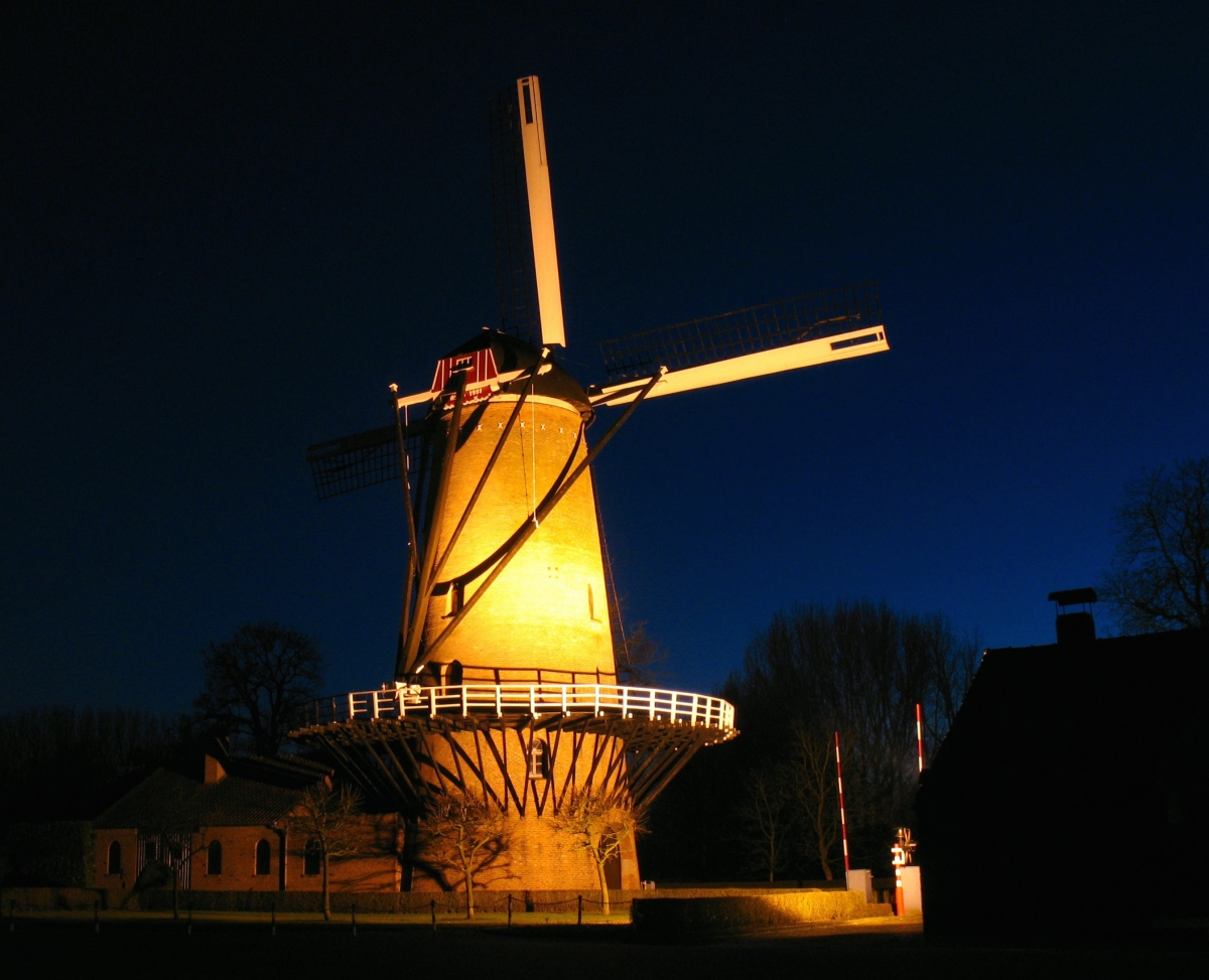 De Bakkersmolen te Essen, provincie Antwerpen